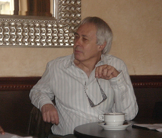 Alain Caillé, réunion du Mauss, Paris XIVe